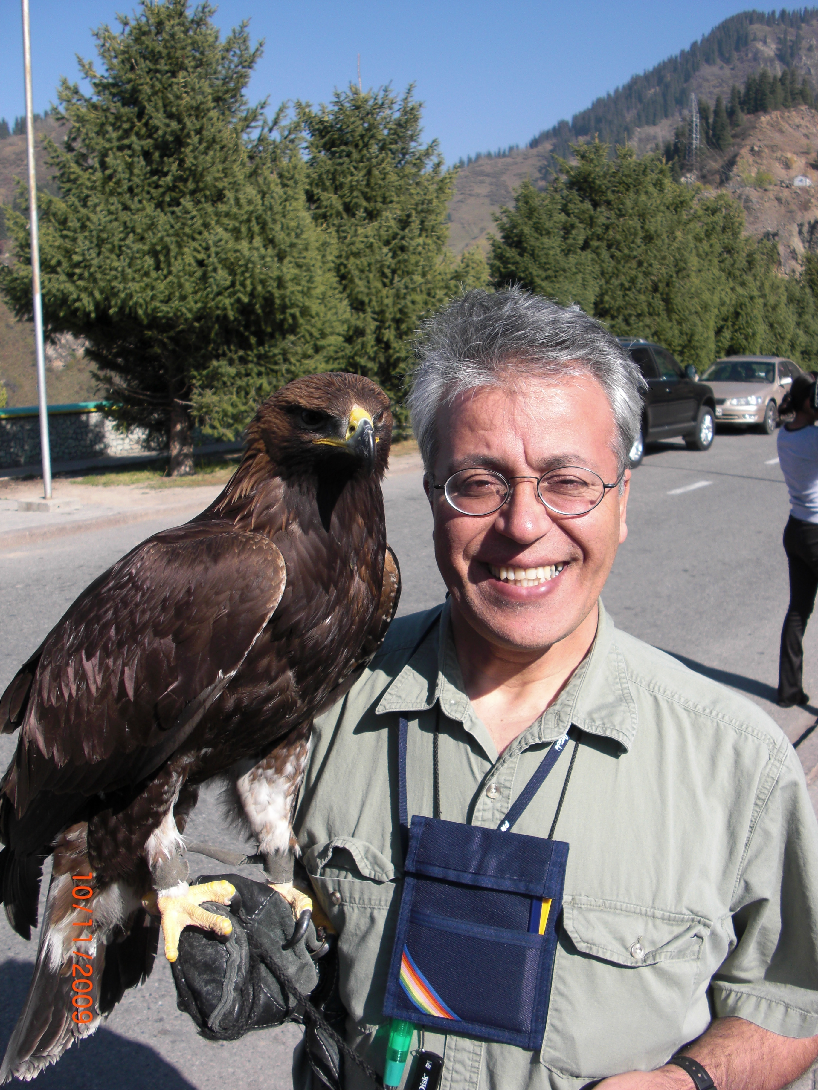 Эдип Юксель, 2008